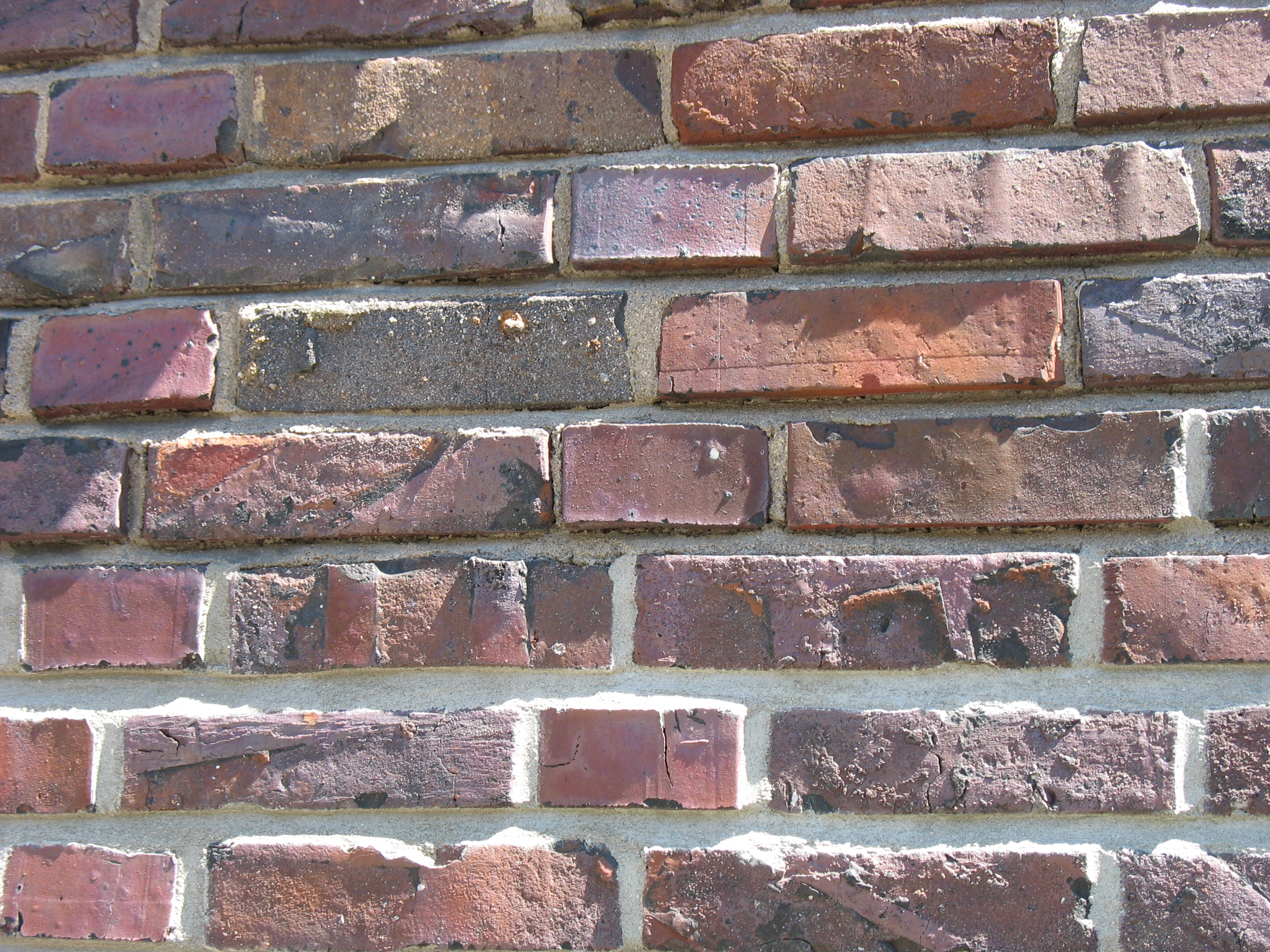 Pfarrkirche St. Anton, Augsburg